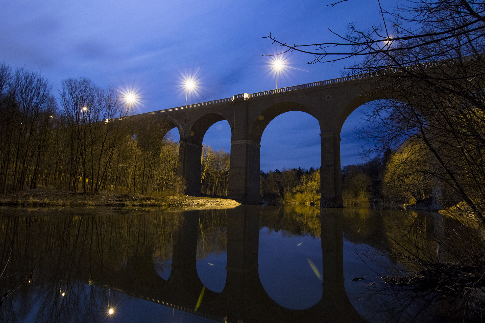 Blick auf den östenlichen Bogen des Neißeviadukts über die Lausitzer Neiße zur blauen Stunde.